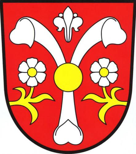 Vyklantice znak